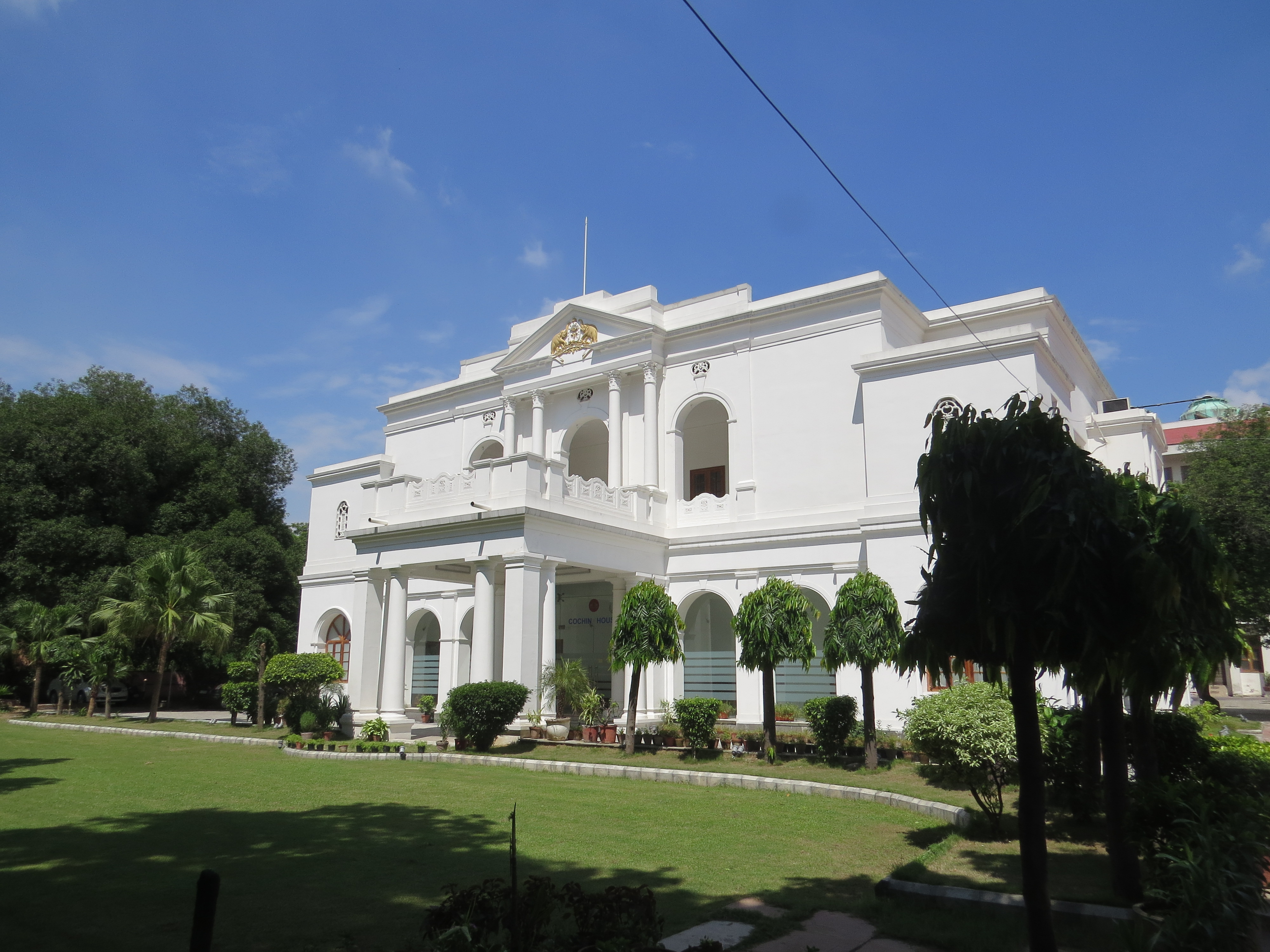 Photos taken during WCI, Chandigarh 2016